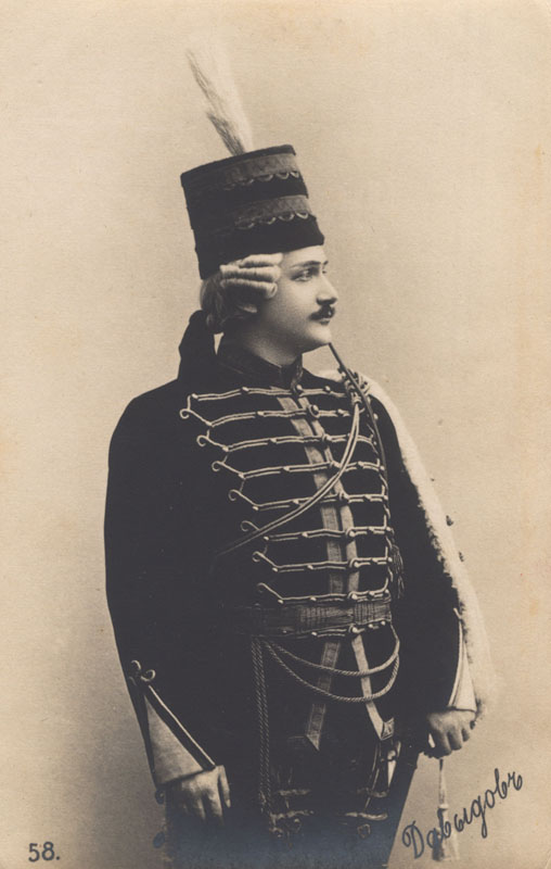 Давыдов Александр Михайлович в роли Германа